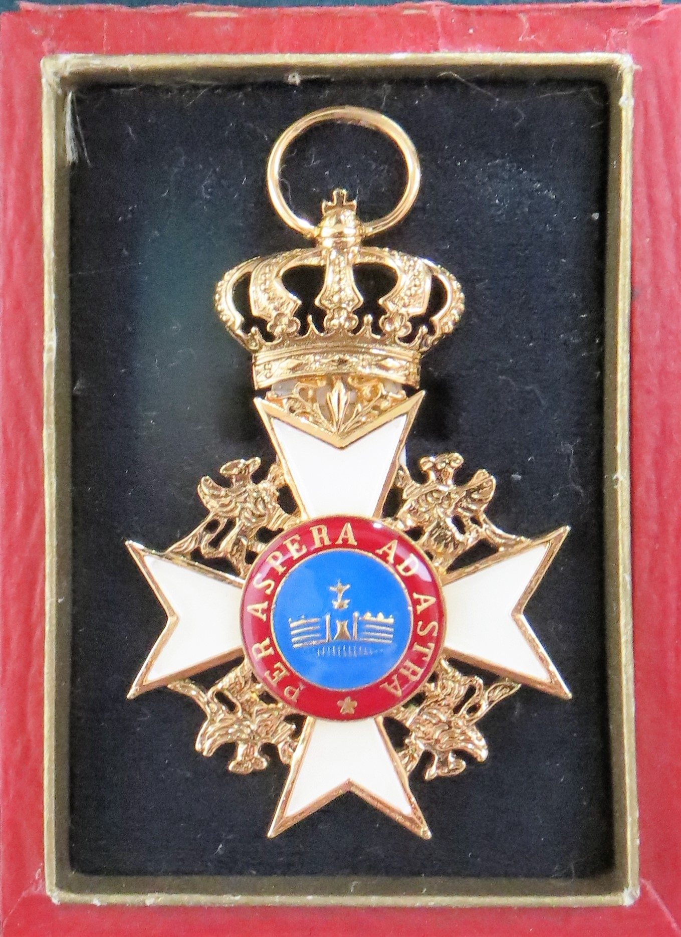 Hausorden der Wendischen Krone, Komturkreuz; im Schloss Hohenzieritz